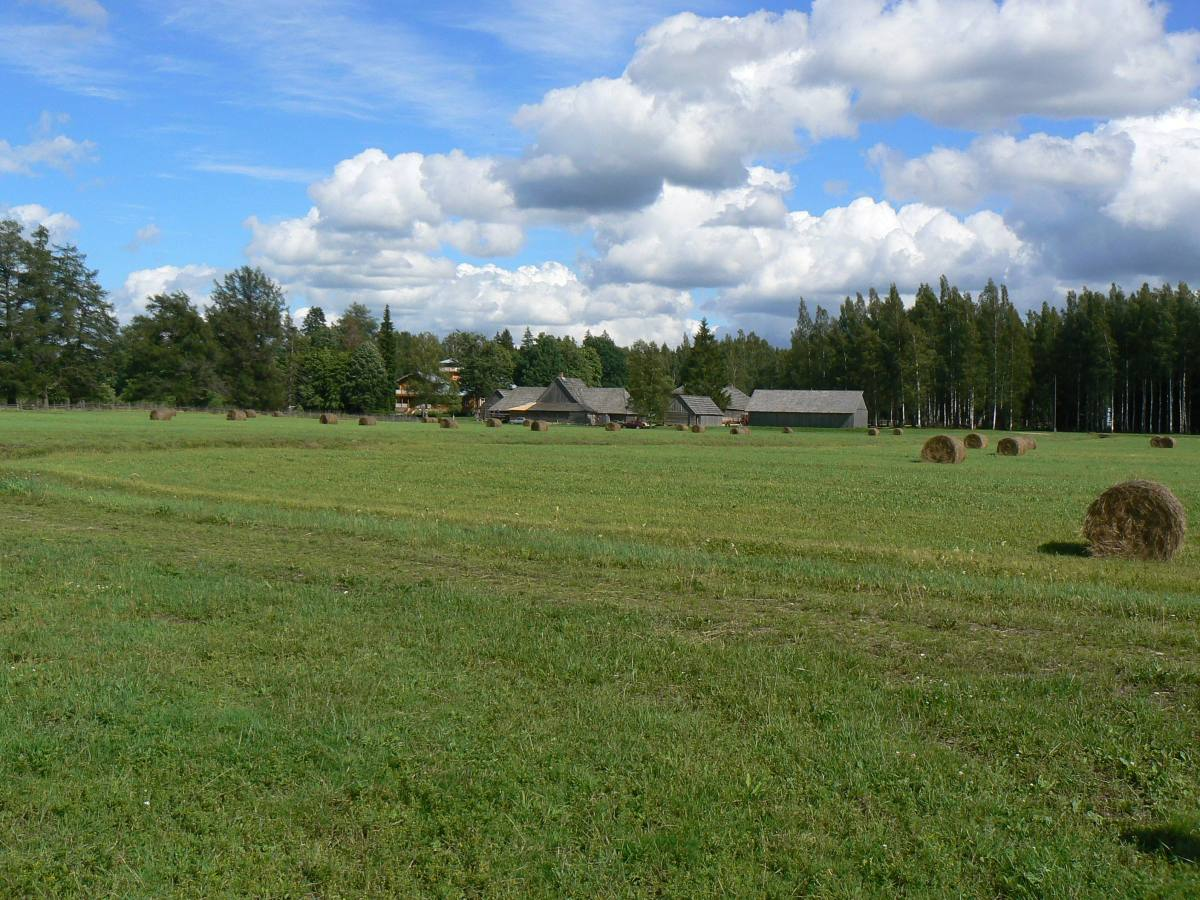 Kurgja talumuuseum